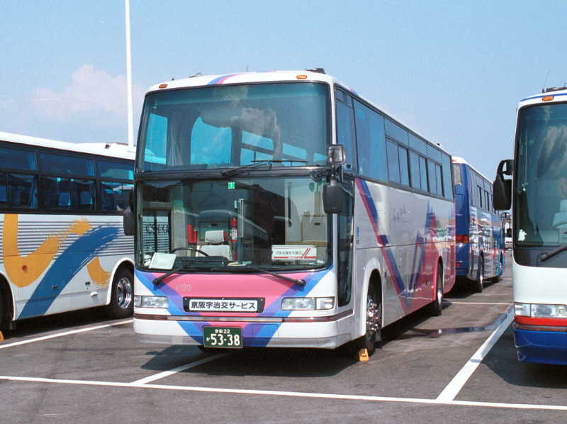 撮影場所失念